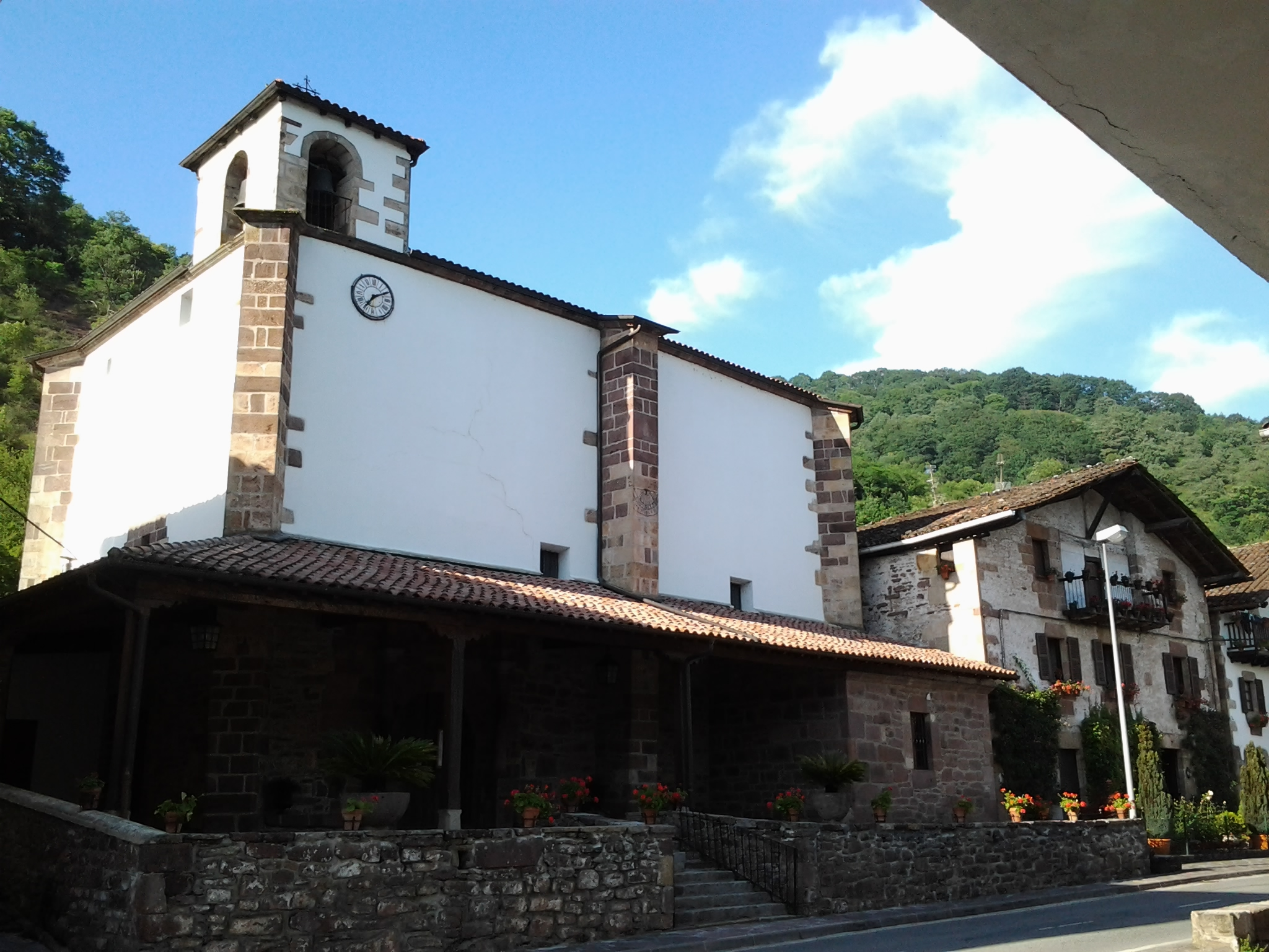 Iglesia de Elorriaga (Navarra)